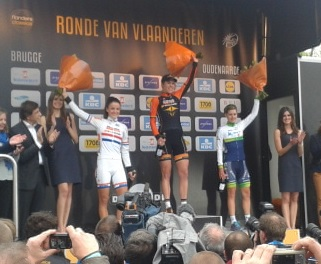 Podium Ronde van Vlaanderen voor vrouwen 2014. 1) Ellen van Dijk 2) Lizzie Armitstead 3) Emma Johansson